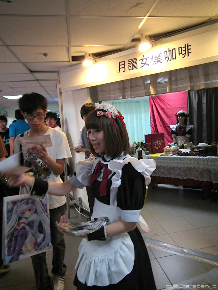 第20屆開拓動漫祭，月讀女僕咖啡攤位。